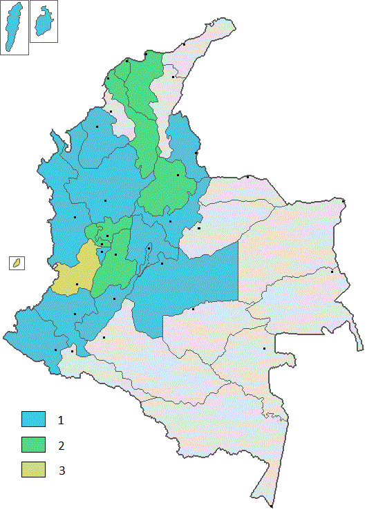 La cantidad de ediciones que se han realizado en cada departamento de los Juegos Deportivos Nacionales